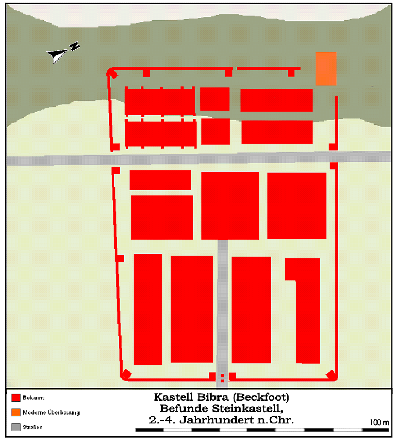 Befundskizze des römischen Küstenkastells Bibra/Beckfoot (GB), Forschungsstand 2006.